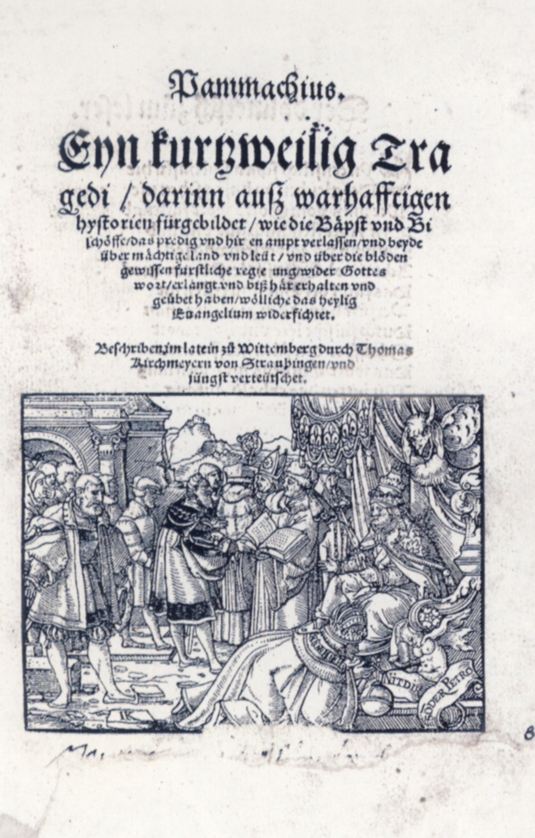 Thomas Naogeorgius: Pammachius, Titelholzschnitt von J. Kallenberg, Bern 1545 (Prädikantenbibliothek Isny)